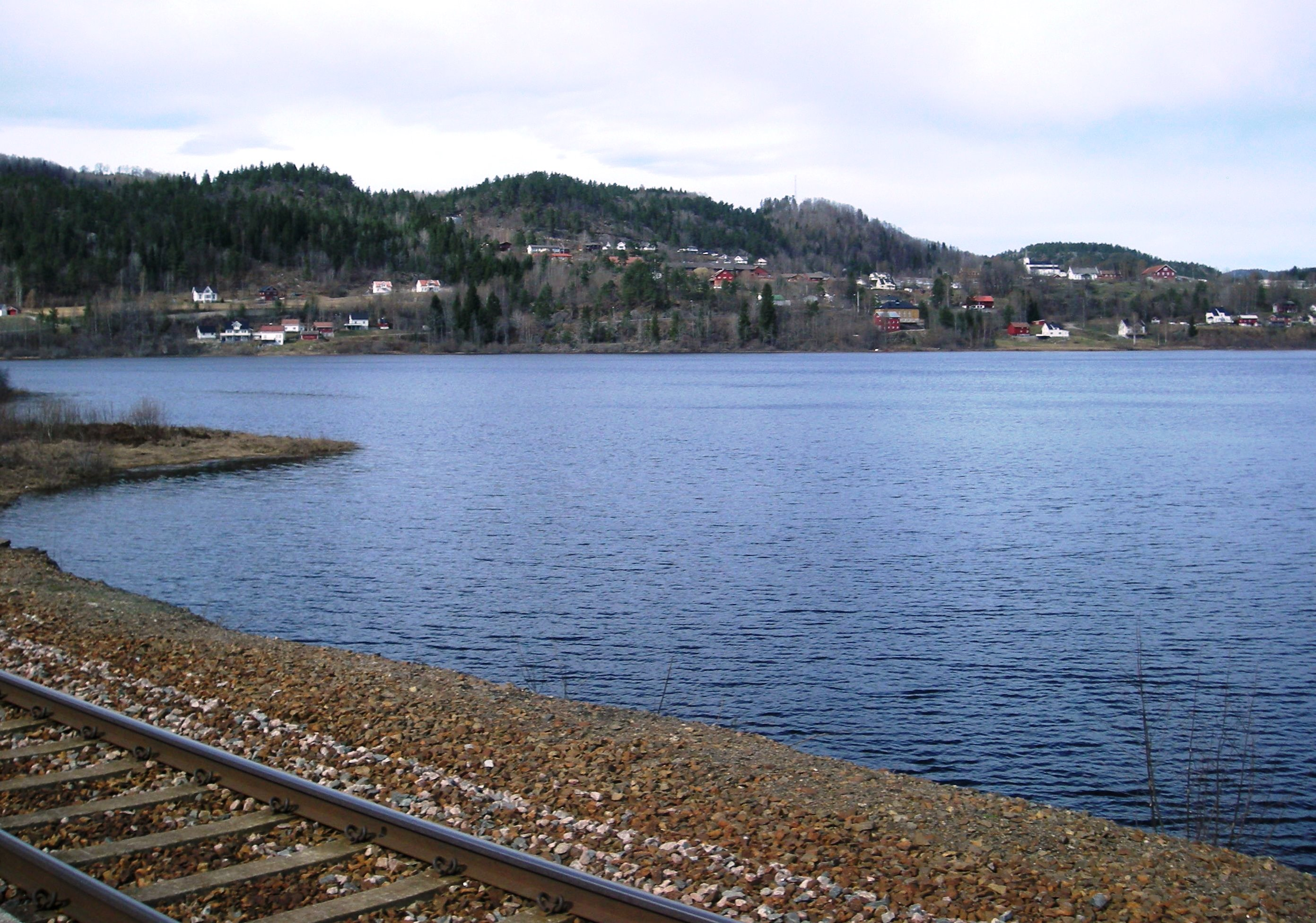 Gjerstadvatnet ved Gjerstad stasjon